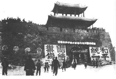 1937年5月，国民党派出国民政府军事委员会委员长西安行营考察团（简称中央考察团），到陕甘宁特区和红军驻地考察，了解中国共产党和特区的各方面情况，以及中国共产党对国共两党合作抗日的态度。图中为欢迎“西安行营考察团”，肤施城门上张贴标语：欢迎为国共合作而努力的中央考察团。